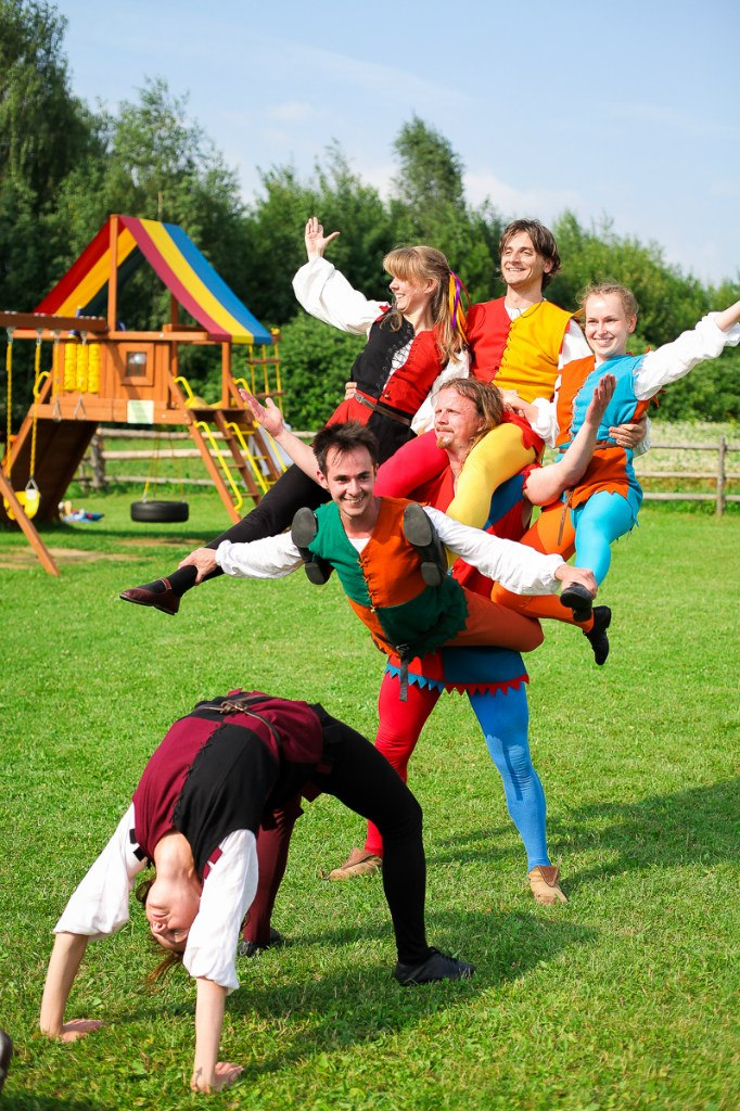 Беларуская (тарашкевіца): DiGrease's Buffoon Theatre - Acrobatic medieval show Акрабатычнае сярэднявечнае шоу "Шальмоўскага Тэатру ДыГрыза"